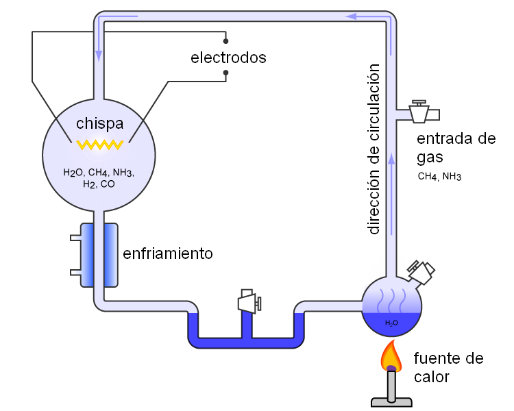 Miller-Urey experiment